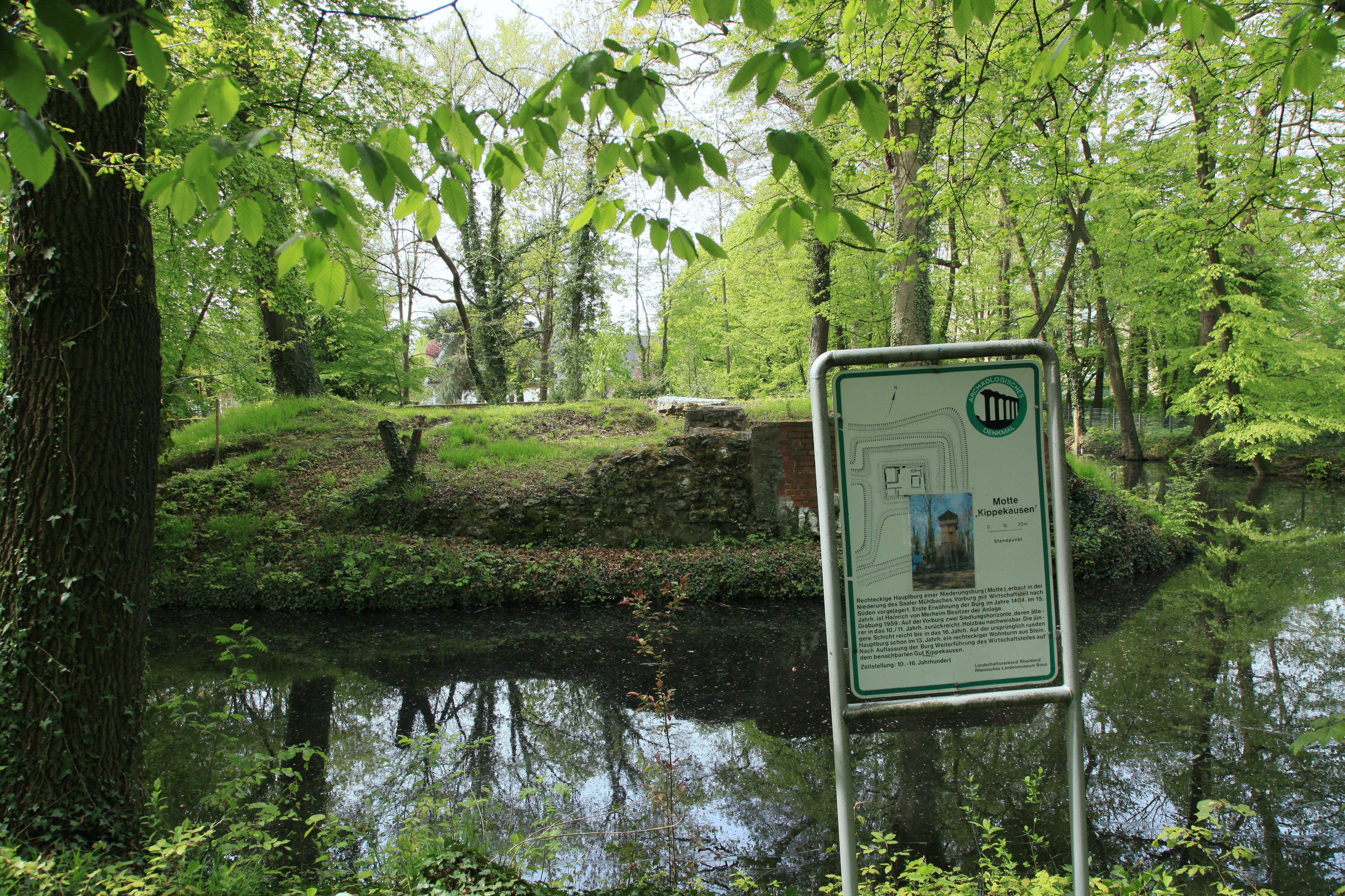 Motte Kippekausen, Burgplatz in Refrath, Bergisch Gladbach